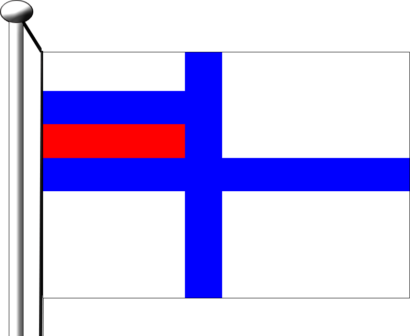 Российская Империя. Высочайше утверждённый Невский яхт-клуб, состоящий под Августейшим покровительством Ея Императорского Высочества Великой Княгини Ксении Александровны. Кормовой флаг судов яхт-клуба, утвержденный Уставом 1895г. Источники: 1. Полное собрание законов Российской империи, собр.3, т.15, №11615 от 1 мая 1895 г. 2. Полное собрание законов Российской империи, собр.3, т.18, №15053 от 16 февраля 1898 г.